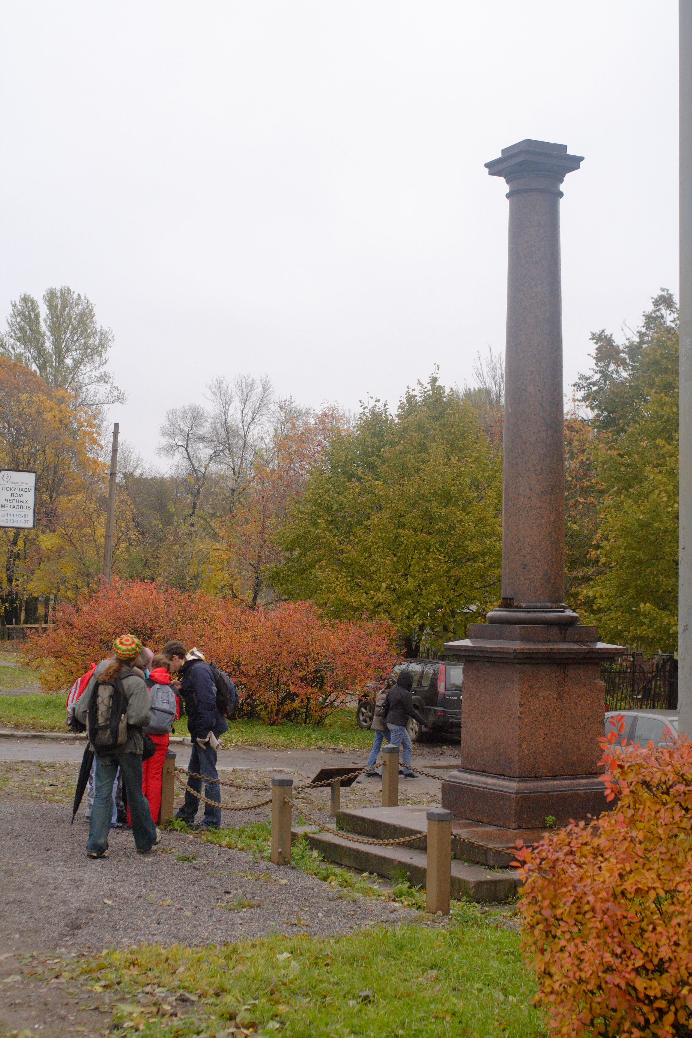 Молвинская колонна в Екатерингофском парке, установлена в 1824 году Монферраном как модель Александрийской колонны в качестве тренировки. Слева у колонны - участники "Бегущего города" Питер-2009.